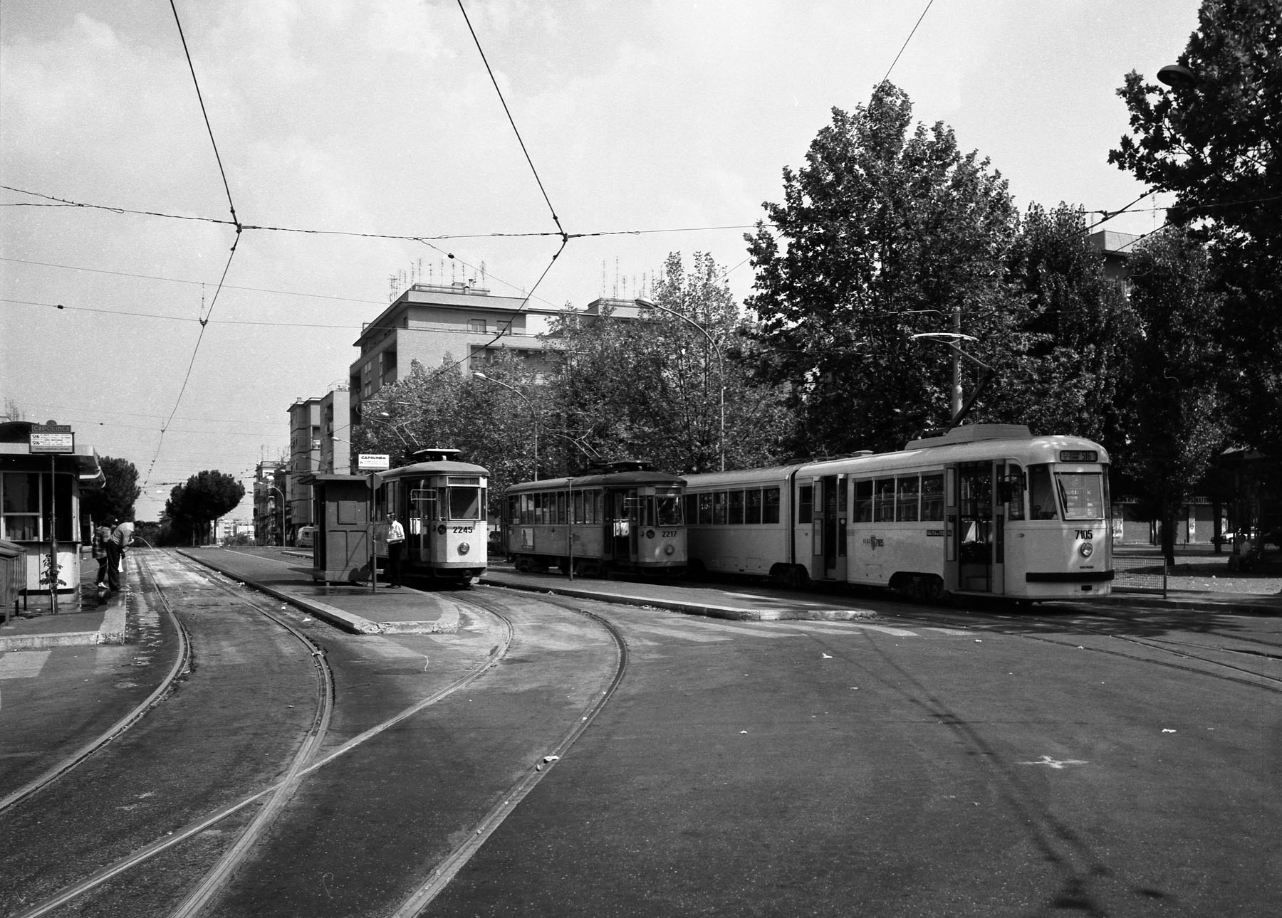 Capolinea ATAC a piazza dei Gerani 1988 Licensing Categoria:Immagini di Indeciso 42 controllate